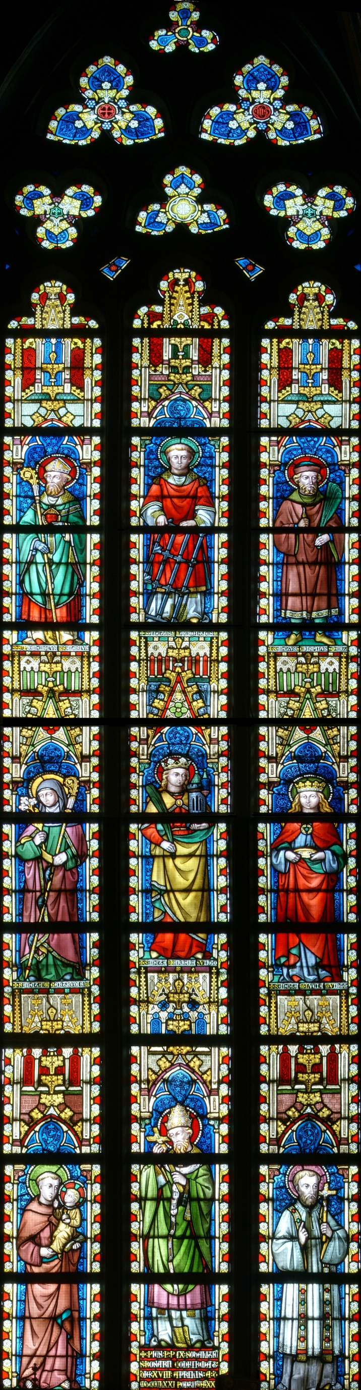 Hoogkoor in de Sint-Germanuskerk (Tienen) - Glas-in-loodraam ontworpen door Jean-Baptiste Bethune